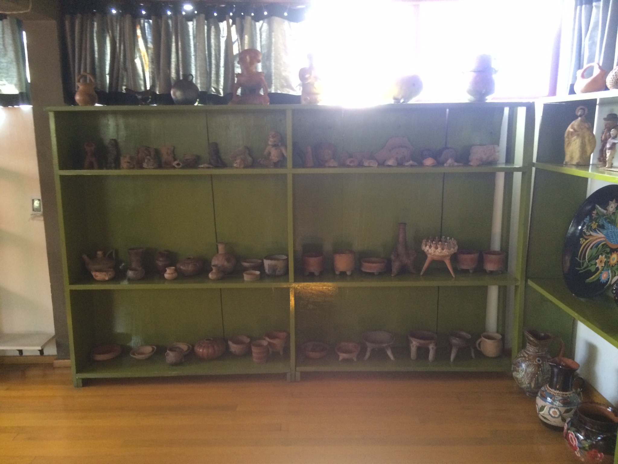 Esta colección se encuentra en el estudio de Diego Rivera en el Museo Casa Estudio Diego Rivera y Frida Kahlo ubicado en San Ángel.